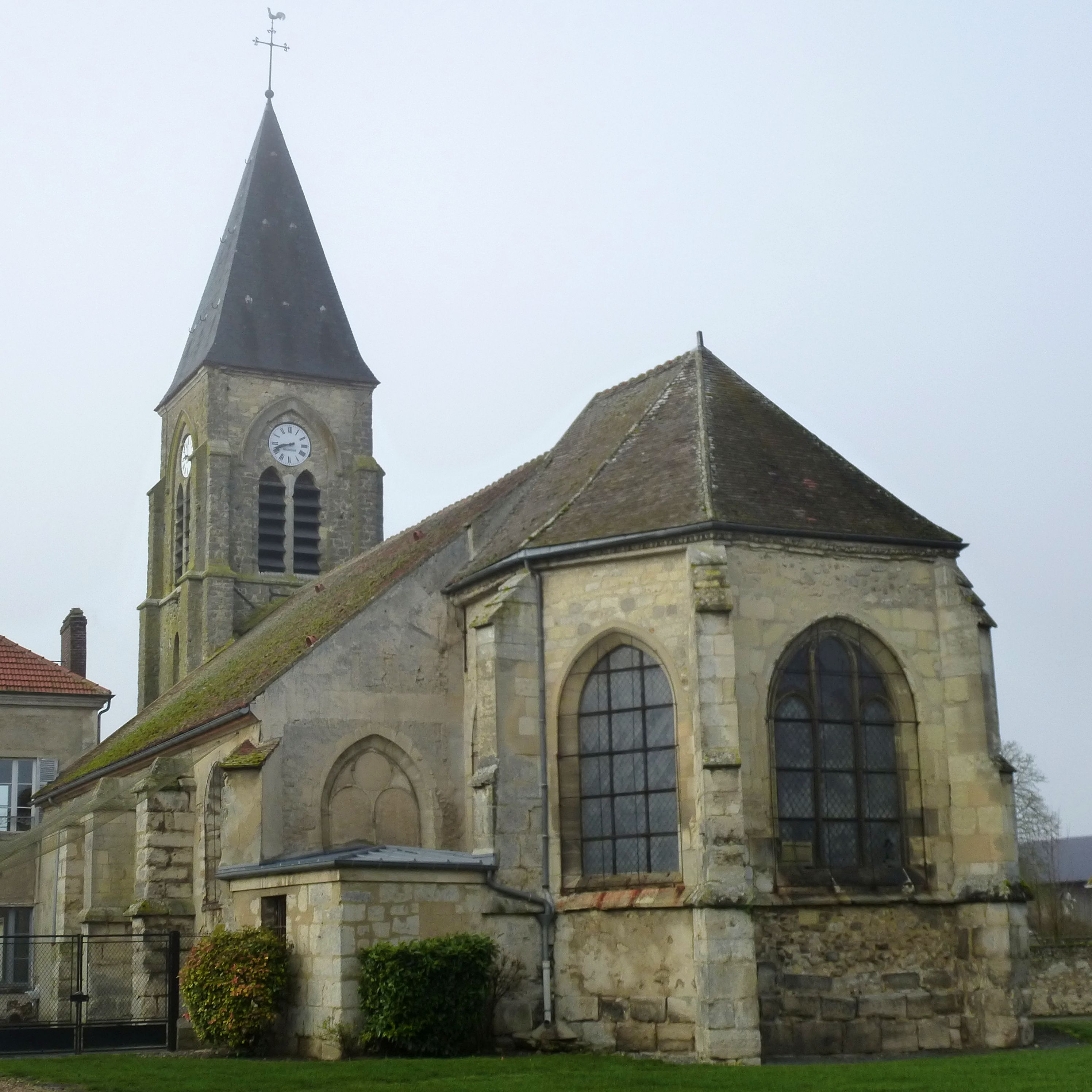 Église Sainte-Geneviève de Barcy (département de la Seine-et-Marne, région Île-de-France).